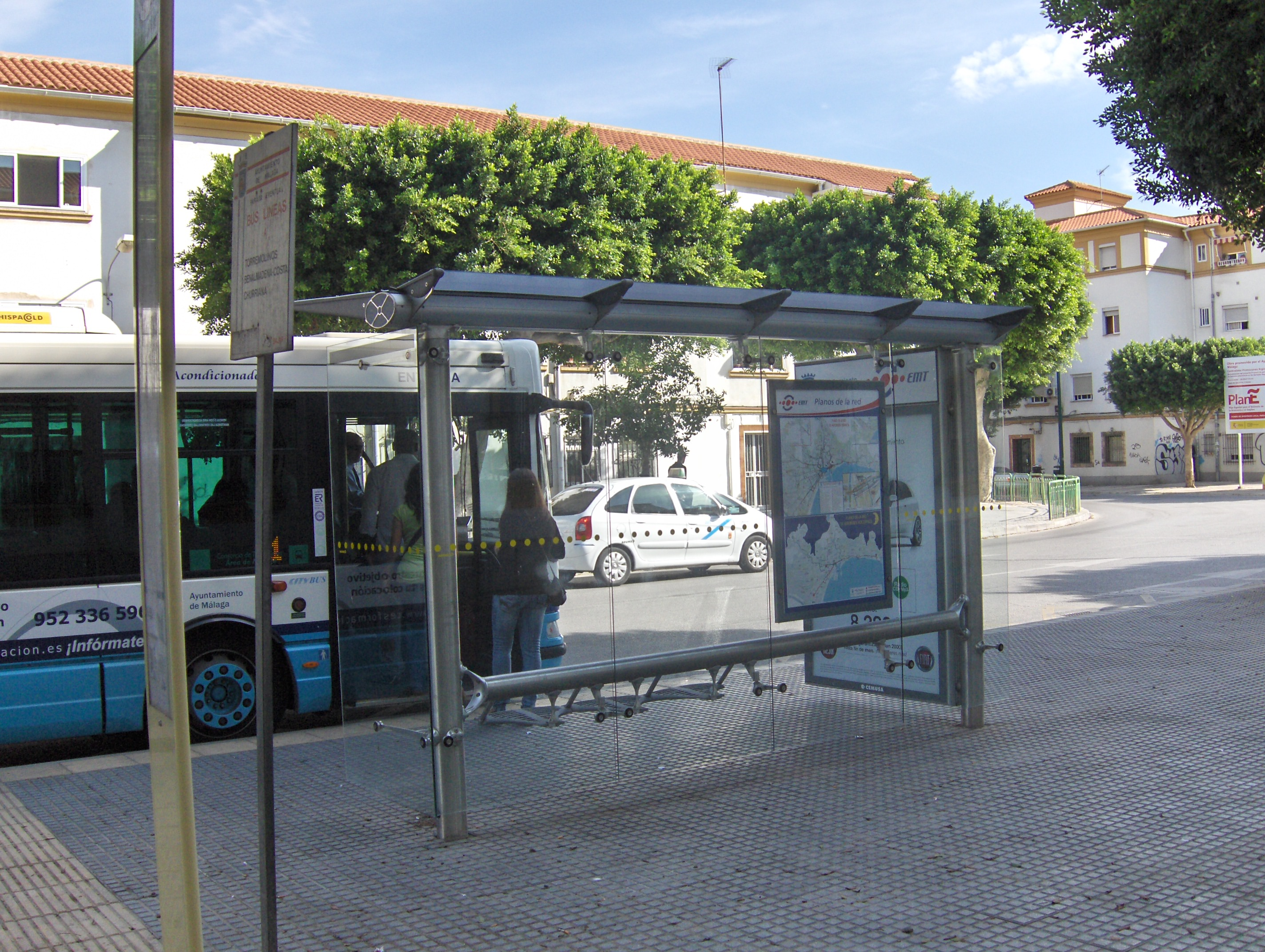 Parada de la EMT en la Avenida de la Paloma, Carretera de Cádiz, Málaga, España.